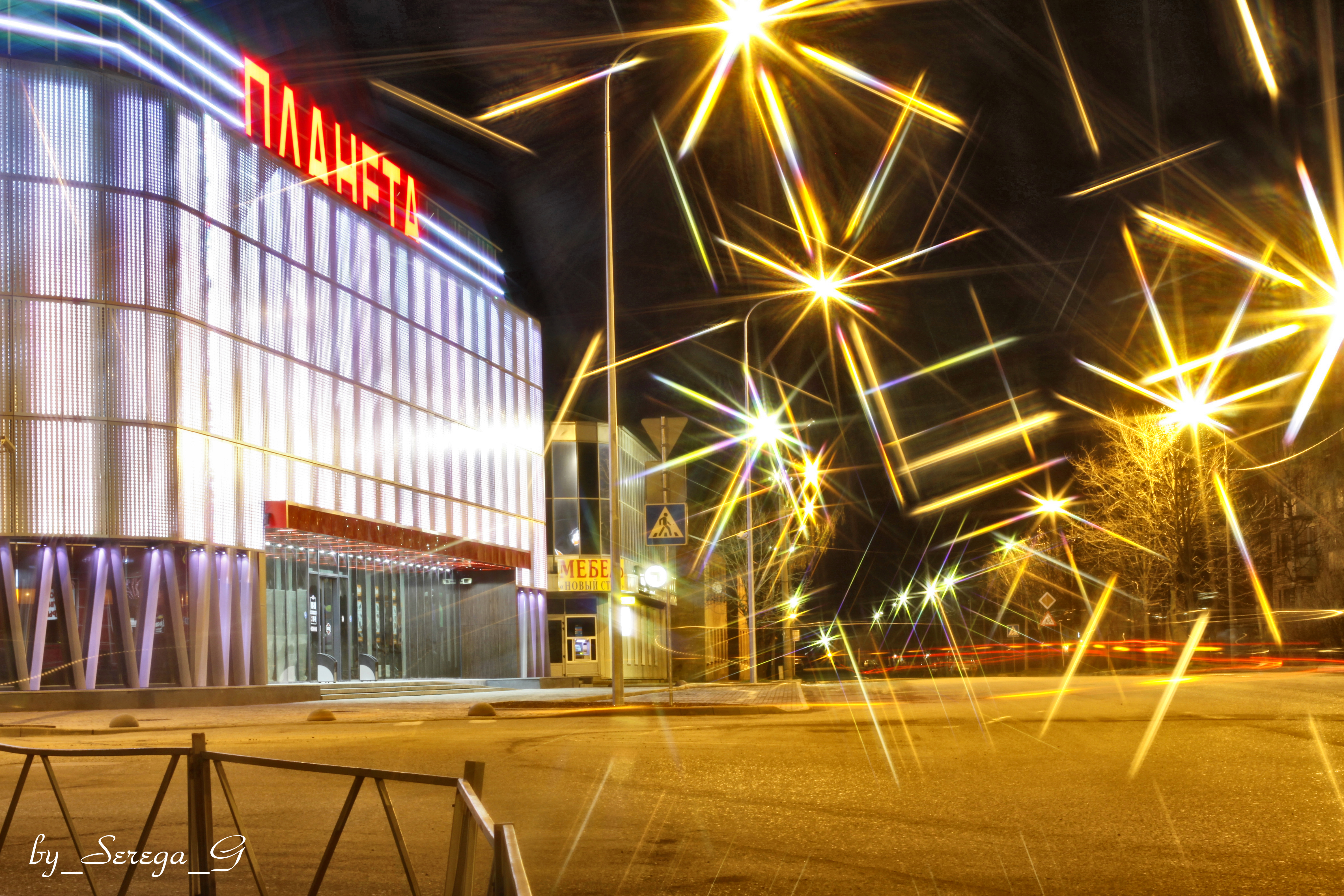 Один из торговых центров Великих Лук